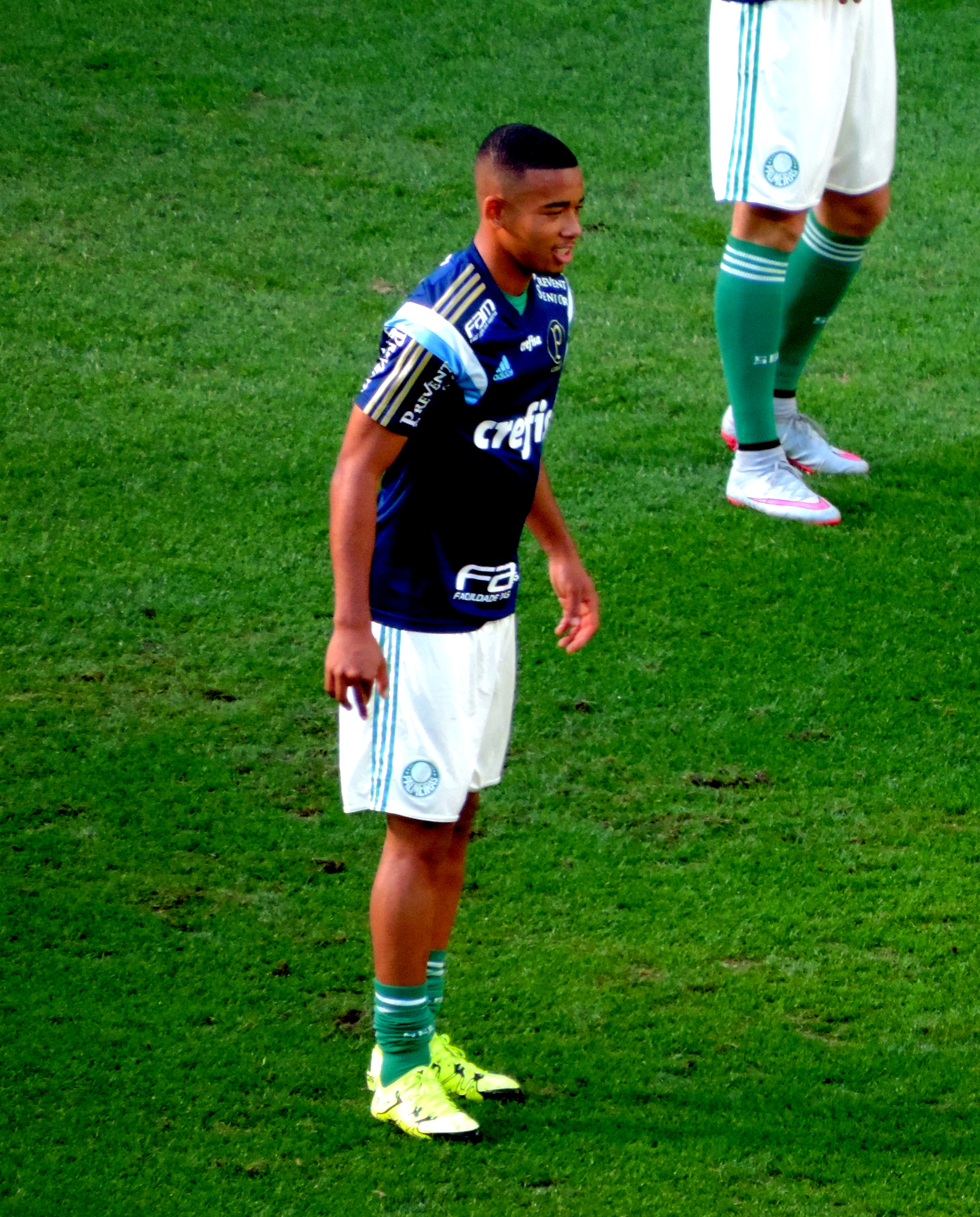 Gabriel Jesus. Foto: Roberto Sabino